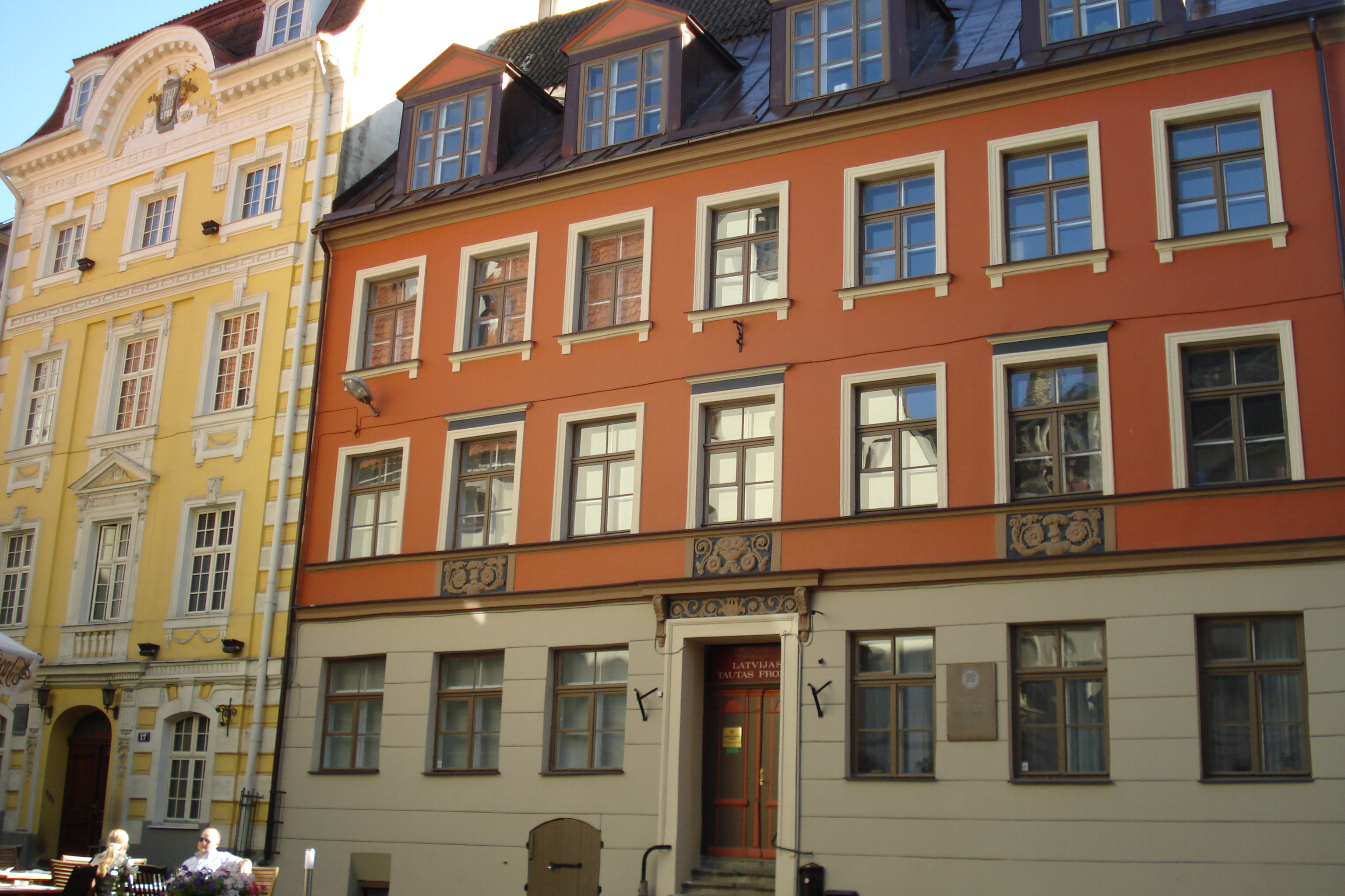 Tautas frontes muzejs (Vecpilsētas ielā 13/15). Музей Народного фронта. Вецпилсетас 13/15, Рига